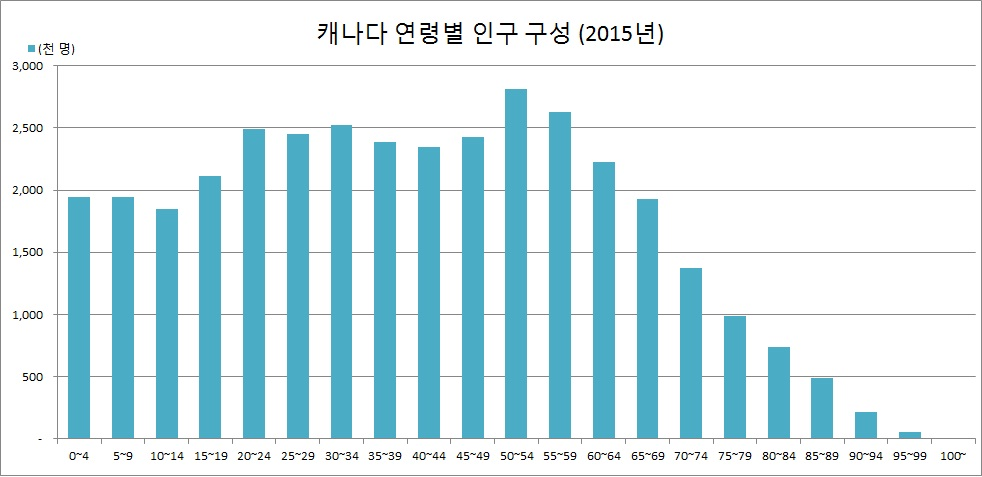 한국어 (조선): 캐나다 연령별 인구 구성 (2015년 UN 통계자료를 바탕으로 제작)